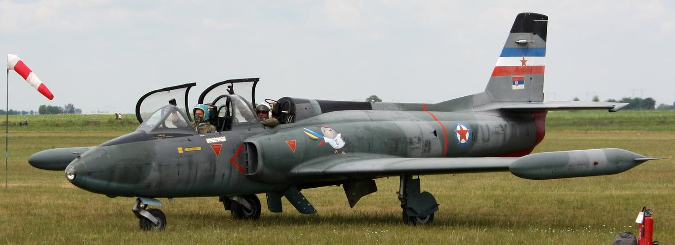 Сахара преузео Soko G-2A Galeb.jpg и подесио